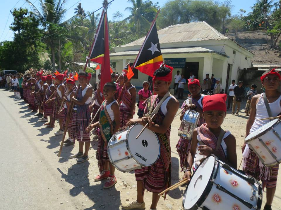 Igreja de S. João Bosco de Laga